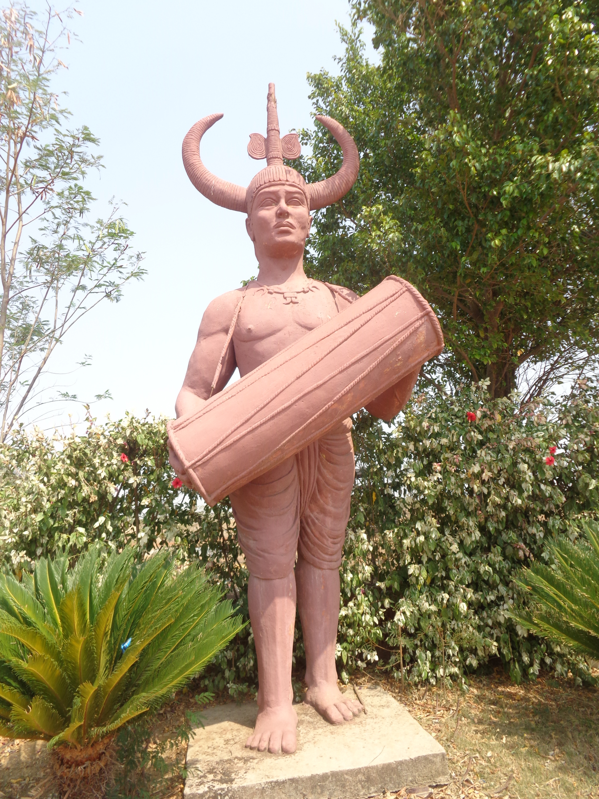 purkhauti muktaangan,uparvara, naya raipur, chattisgarh